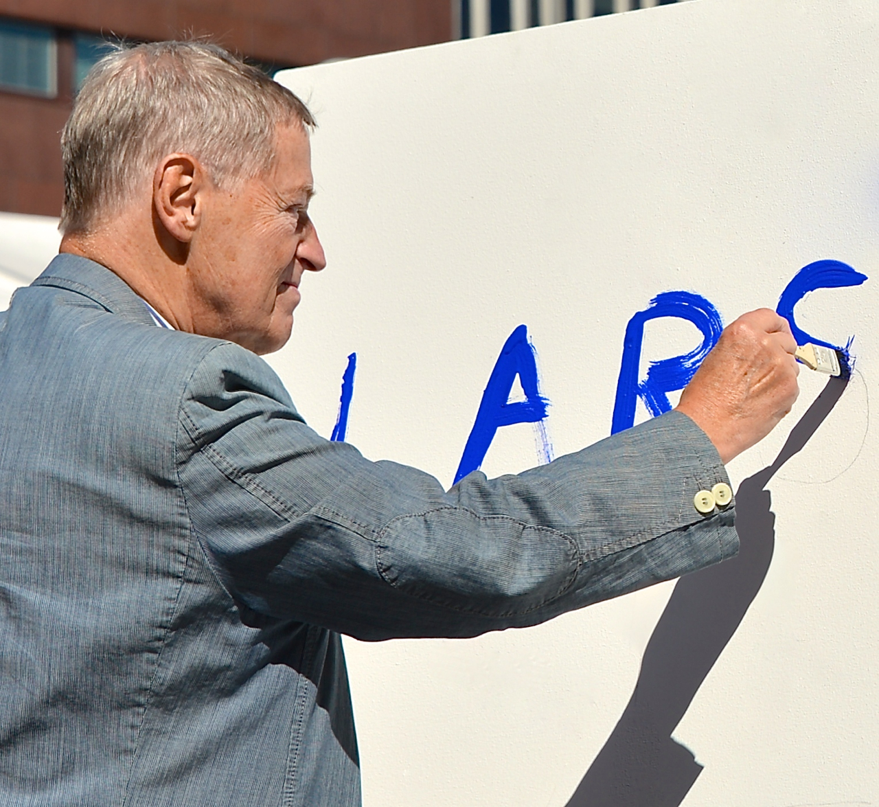 Lars Lind på Sergels torg under Stockholms Kulturfestival 2013. Smakprover ges ur den kommande säsongens föreställningar på Stockholms Stadsteater.